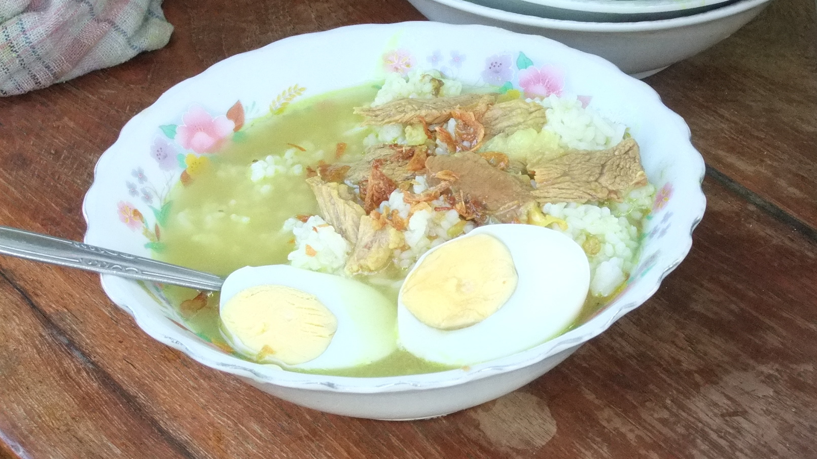 Soto Madura Daging